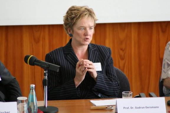 Gudrun Gersmann during the panel discussion. Academy Mainz 2007